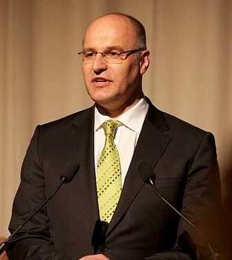 Der Augsbuger Oberbürgermeister Dr. Kurt Gribl